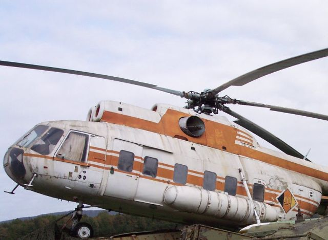 Mil Mi-8S (Salon-/Passagierhubschrauber) der NVA / Wrack Bad Oeynhausen